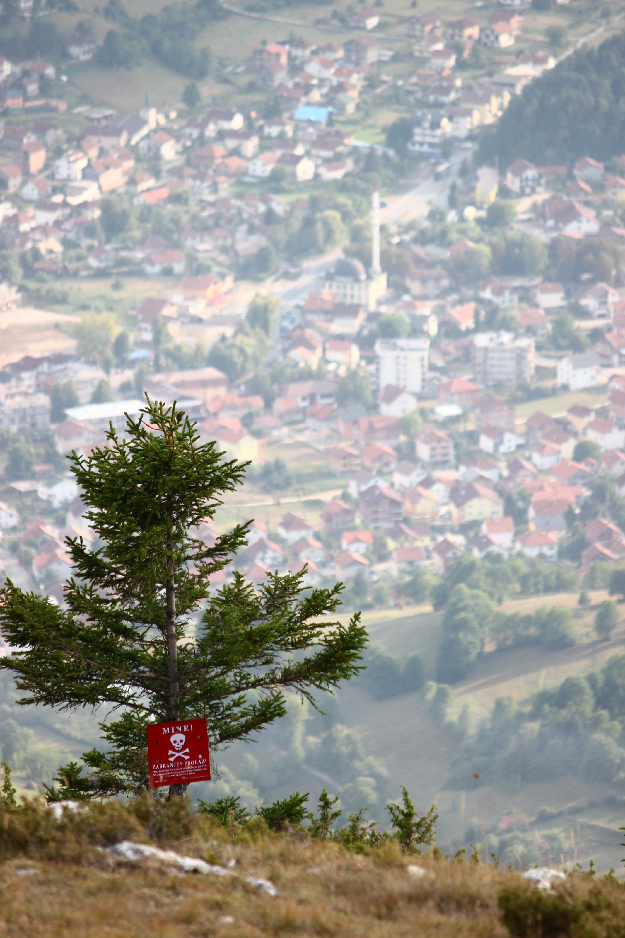 Die Hänge des Vlašić oberhalb von Turbe (Bosnien und Herzegowina) sind vermintes Gelände.